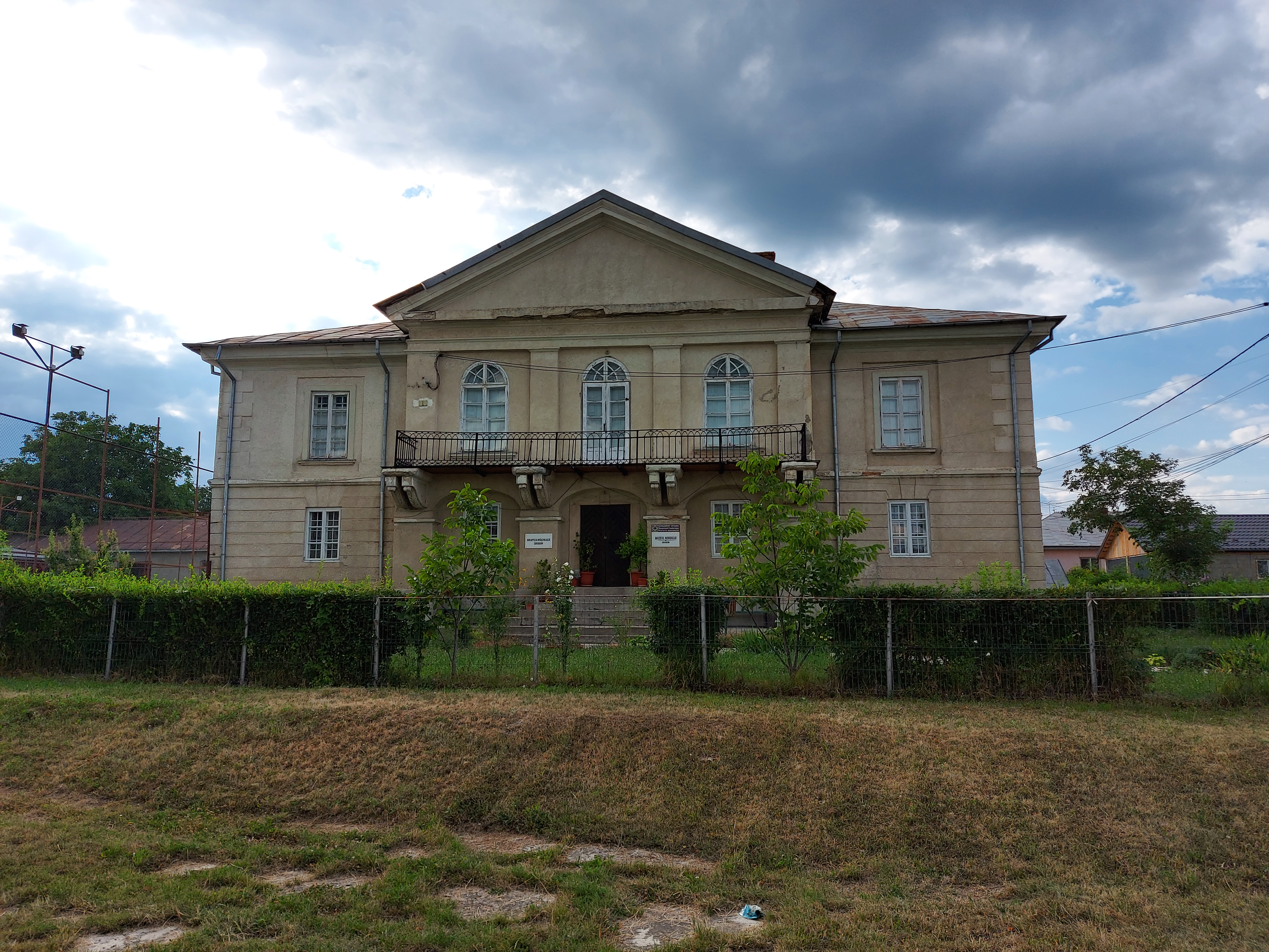 Conacul Theodor Balș din Darabani. Muzeul Nordului. Biblioteca Orășenească din Darabani. 01